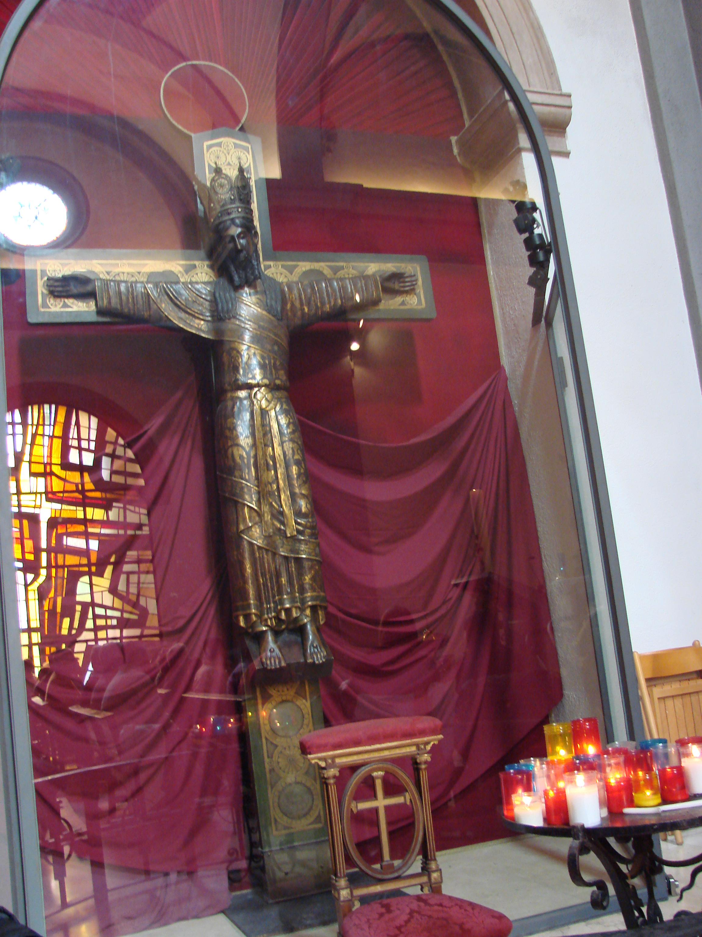 talla bizantina del segle XII-XIII